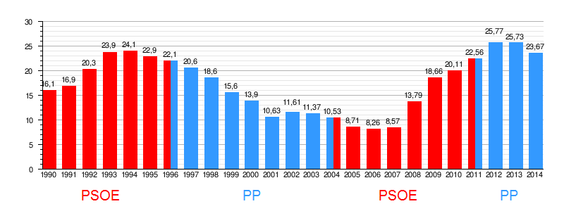 Evolución de las tasas de desempleo en España entre 1990 y 2014, en relación que los últimos gobiernos del país. Fuente: Instituto Nacional de Estadística: Estadísticas sobre el mercado laboral según periodo en el INE Encuesta de Población Activa (EPA)